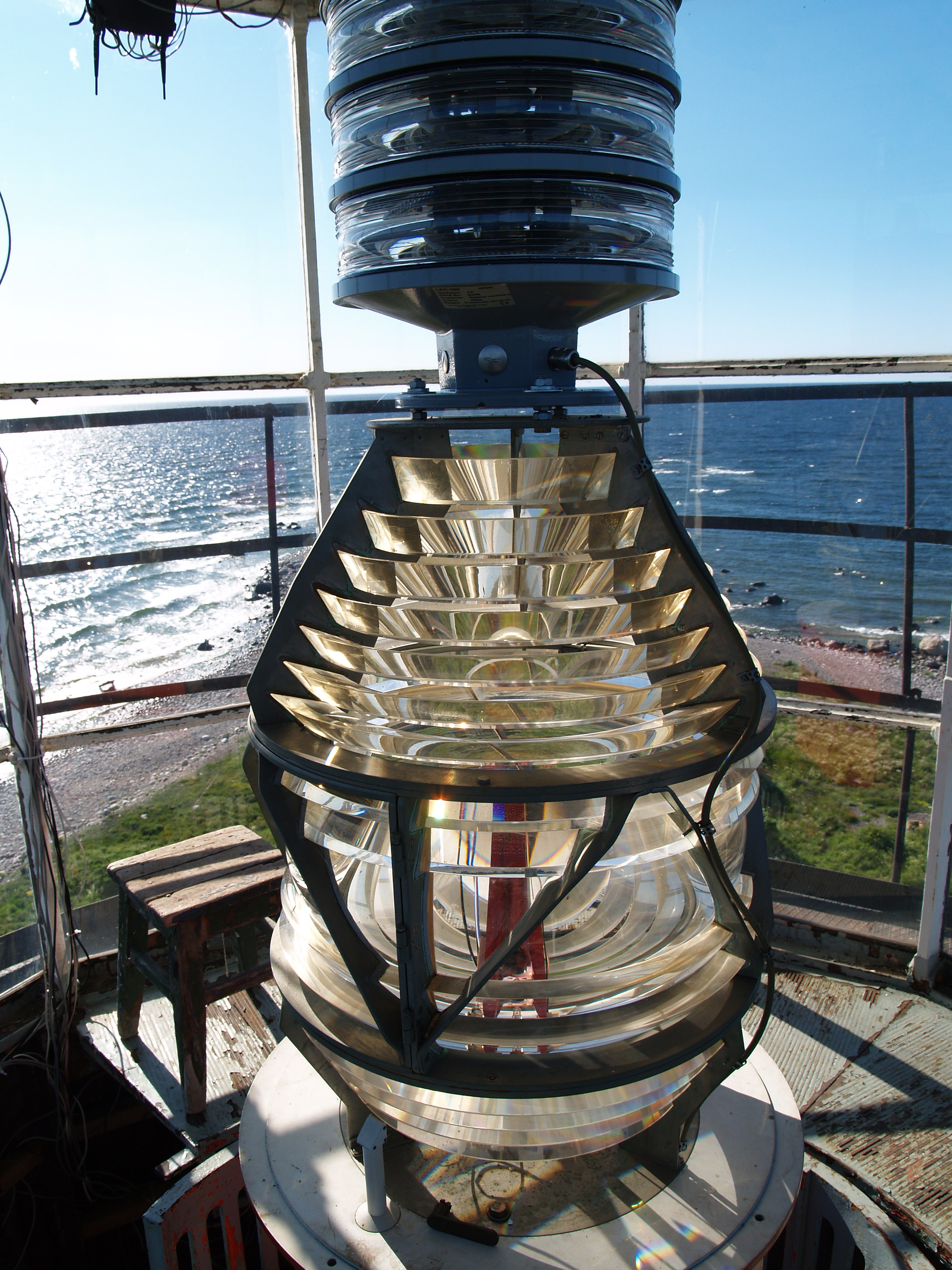 Keri tuletorn. Tornituli.